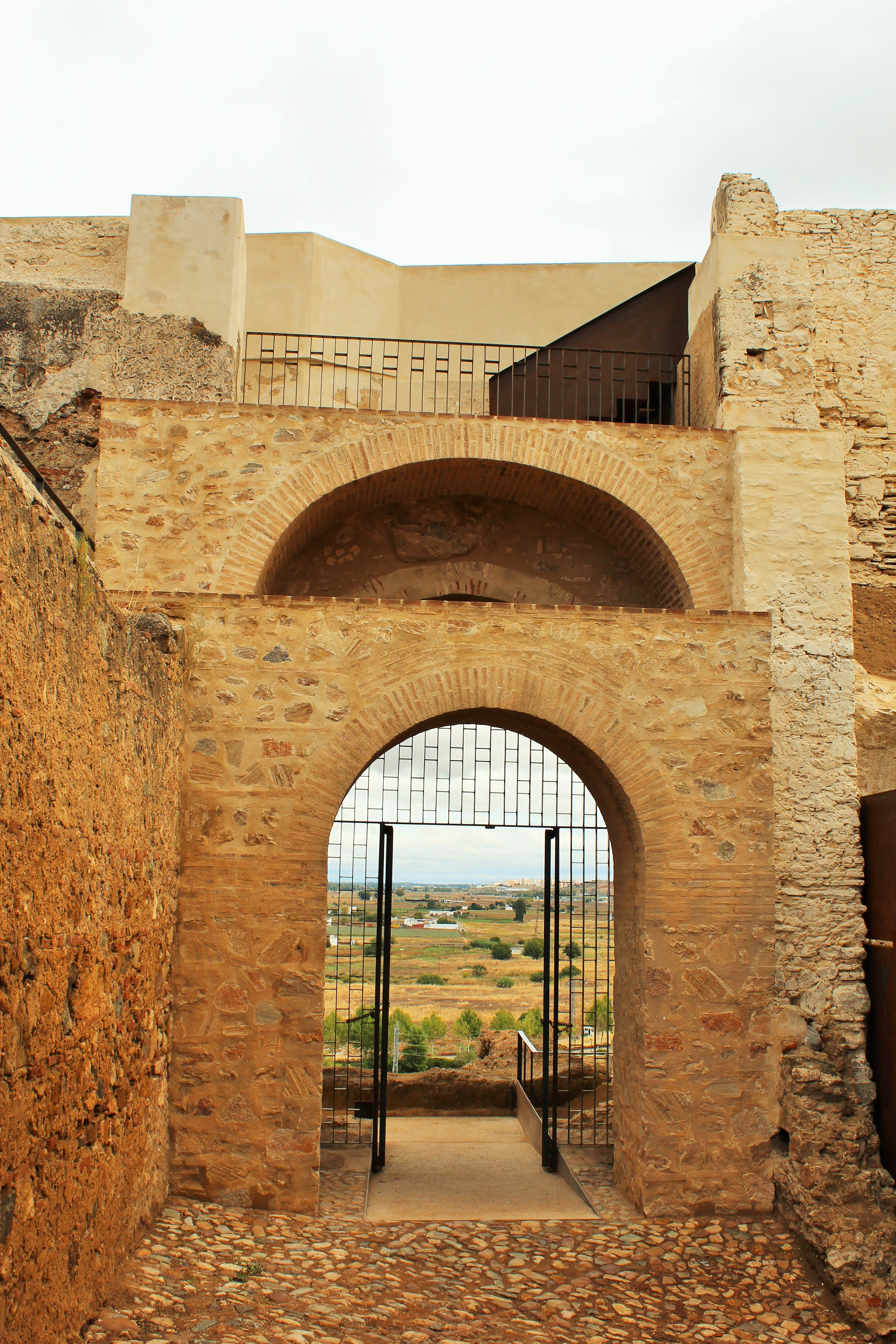 Fachada interior